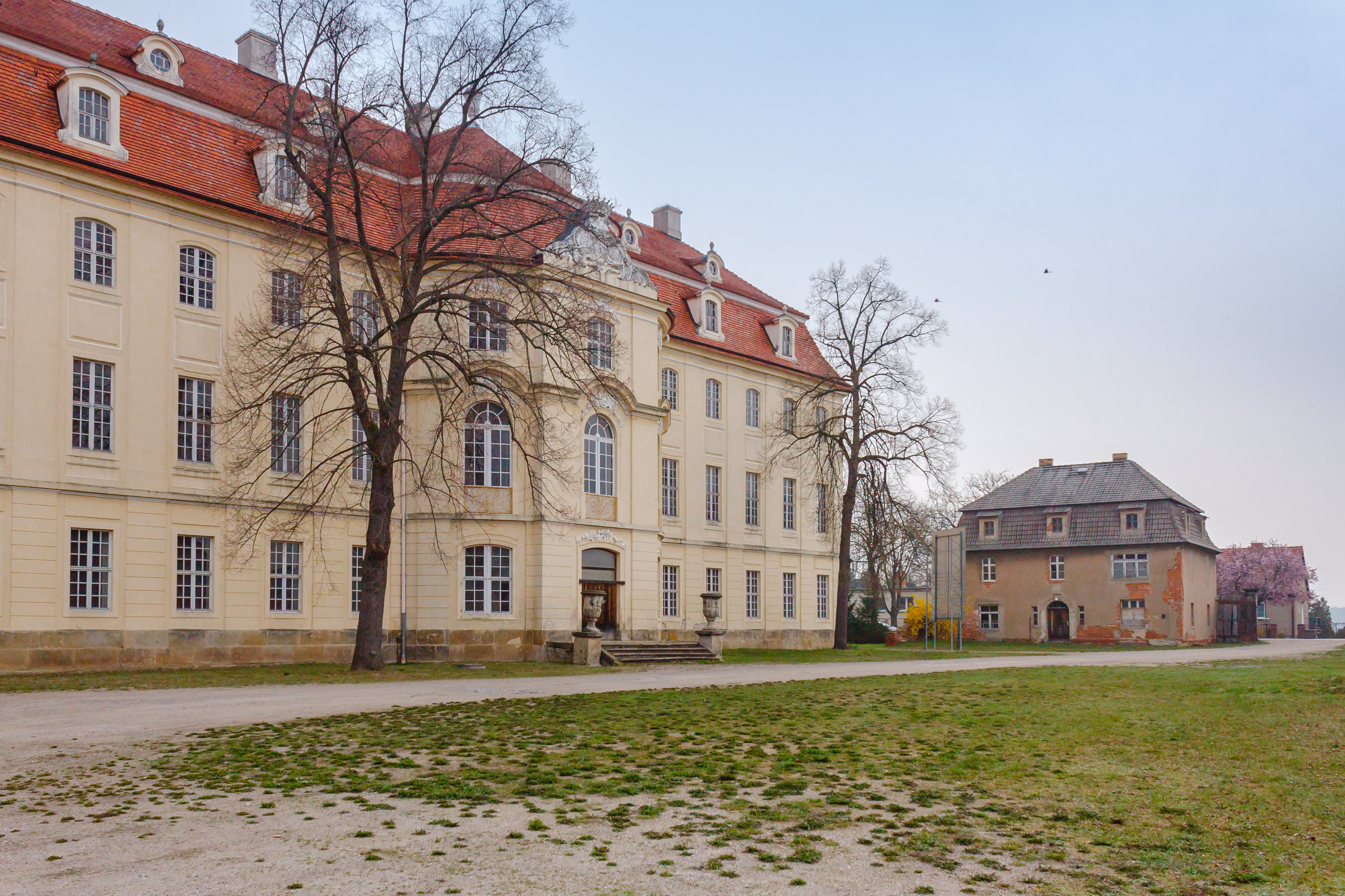 Barockschloss Martinskirchen